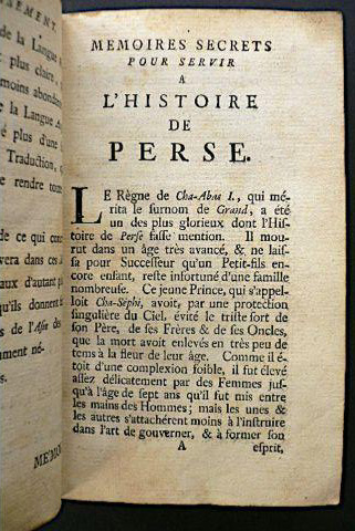 Memoires secrets pour servir a l'histoire de Perse. Aux depens de la Compagnie, à Amsterdam 1745, pet. in-8, relié. Édition originale, page de titre en rouge et noir, reliure en demi basane rouge fin XVIIIe, dos à nerfs décoré de filets maigres et gras. Pièce de titre de maroquin brun.